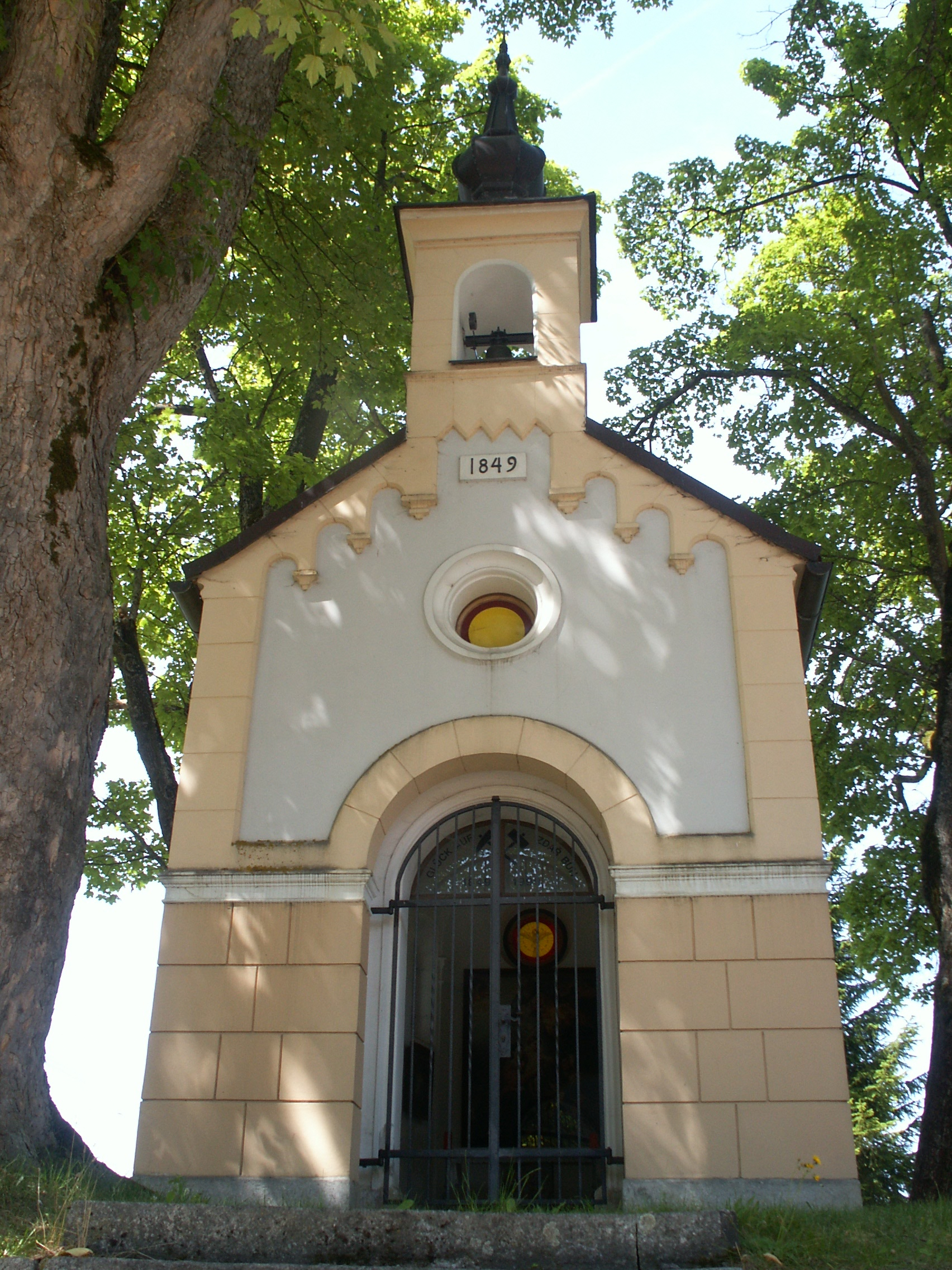 Mokrá - kaple